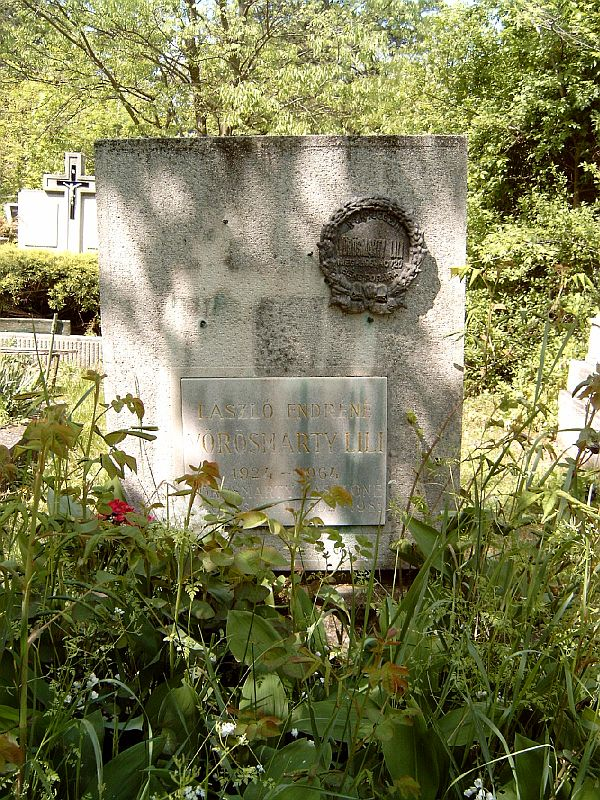 Vörösmarty Lili (Kolozsvár, 1924. máj. 10.–Budapest, 1964. november 20.) színésznő. Vörösmarty Mihály családjából származott. Új köztemető: 21/1-1-254/A.